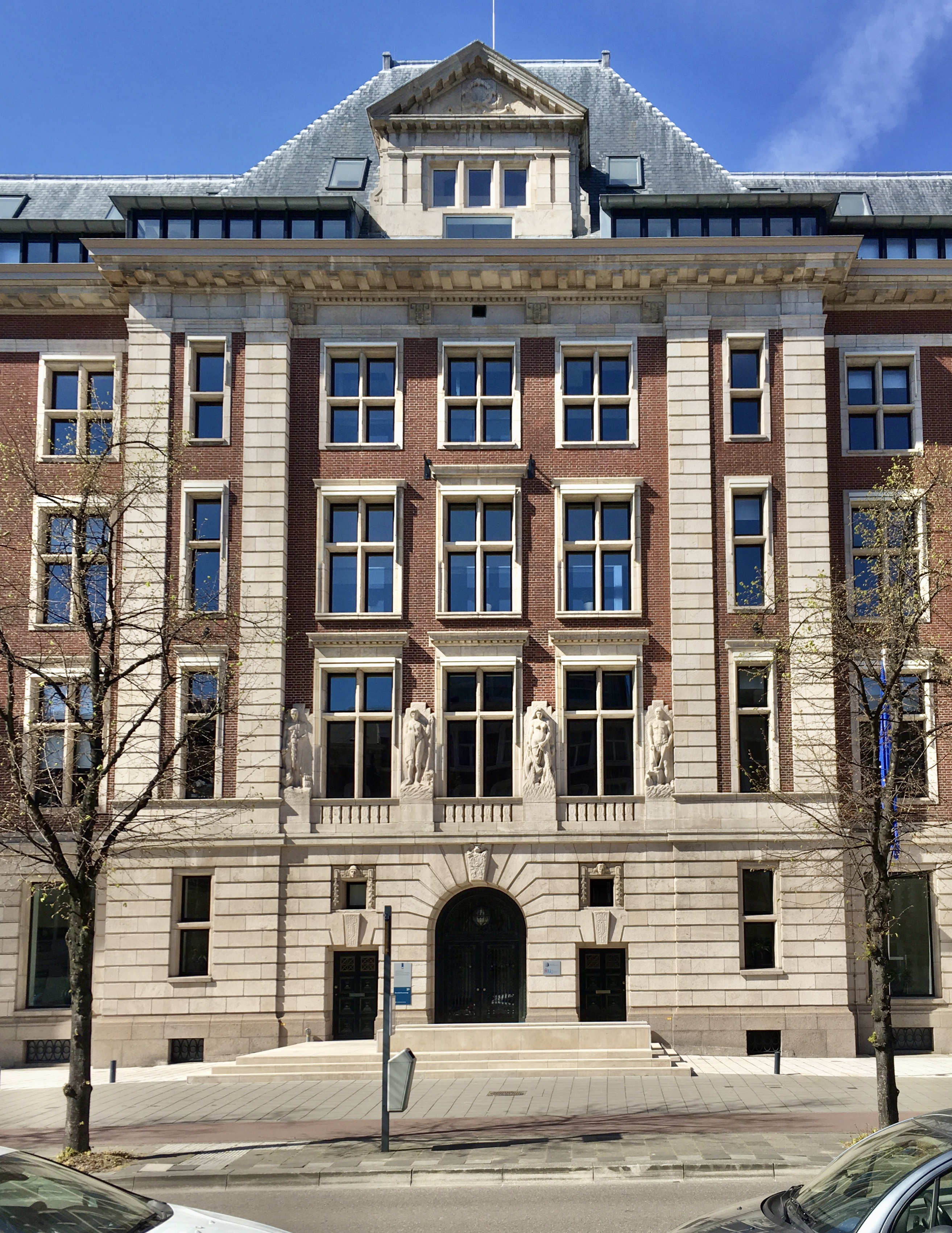 Bezuidenhoutseweg 30, Den Haag